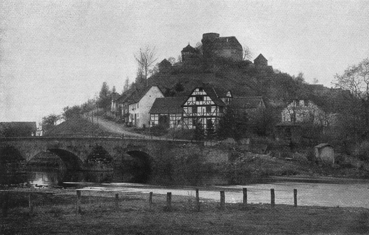 Originalbeschreibung „Trendelburg an der Diemel“. – Hessen, Deutschland.